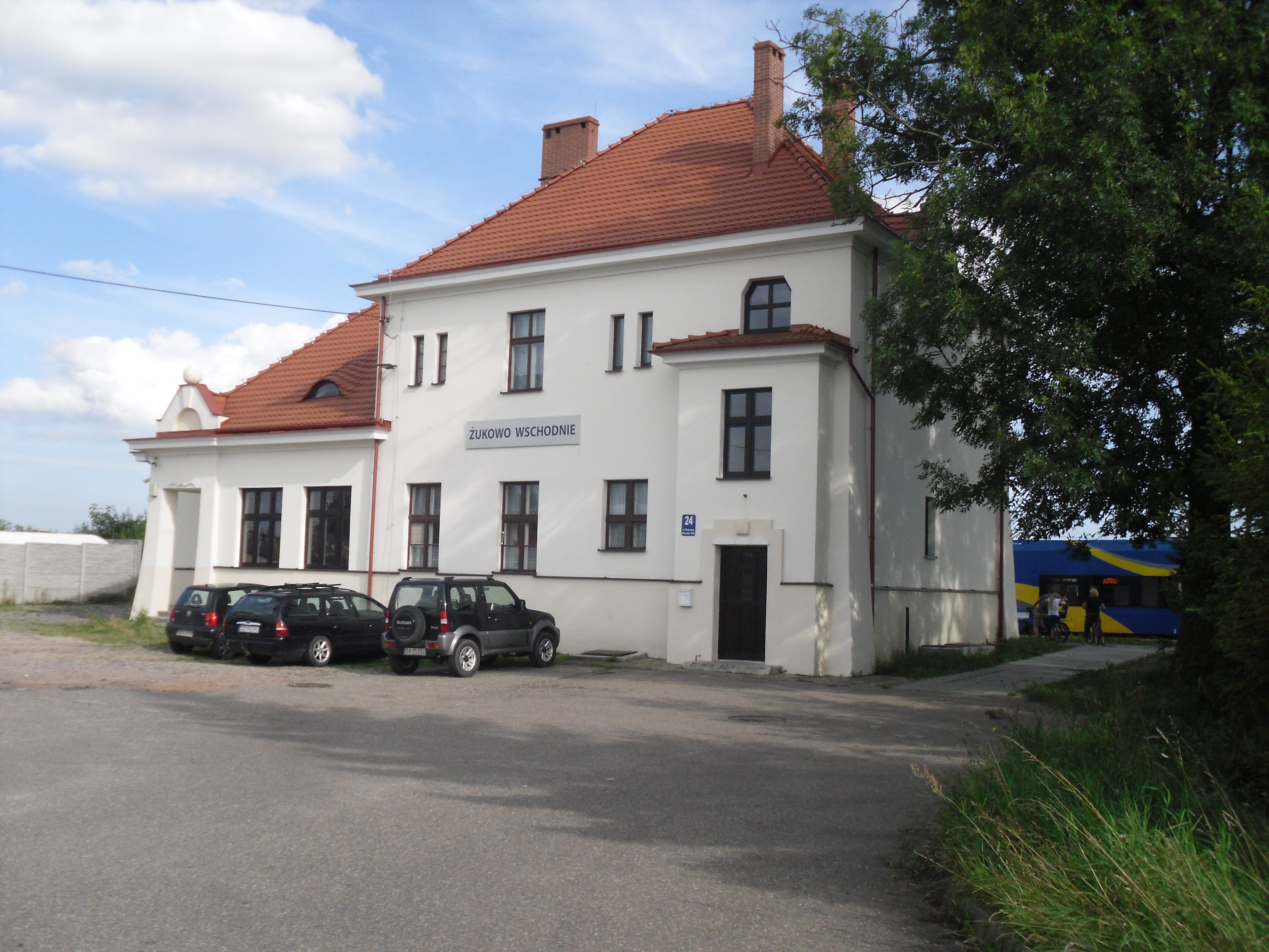 Żukowo Wschodnie od strony ul. Dworcowej